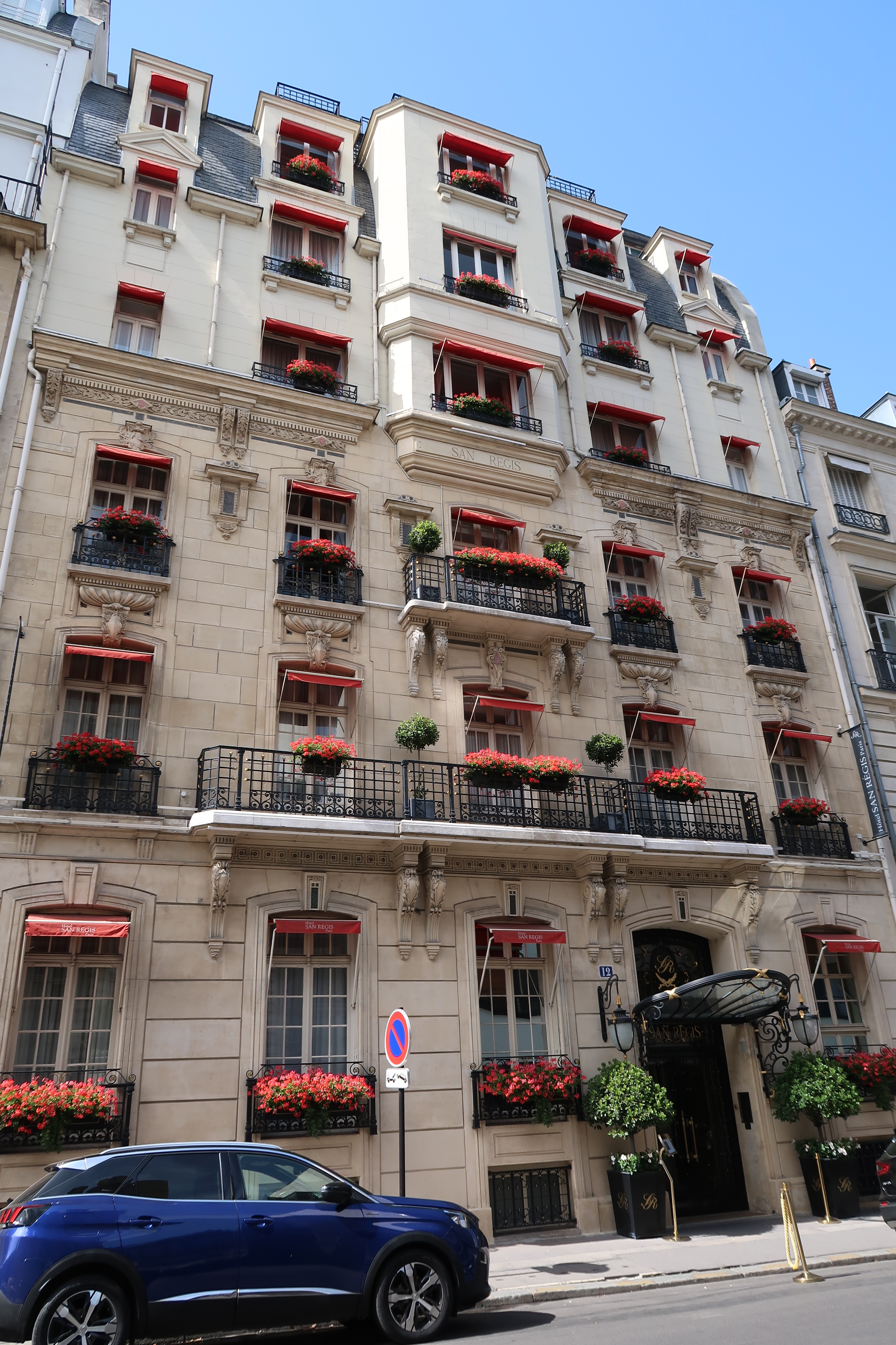 Hôtel San Régis, 12 rue Jean-Goujon (Paris, 8e).